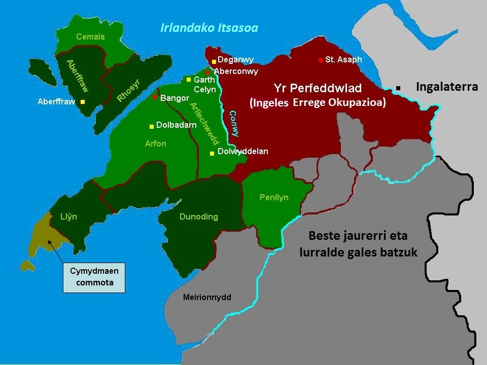 Galesko Gwynedd 1247an, lurraldearen banaketa egindakoan